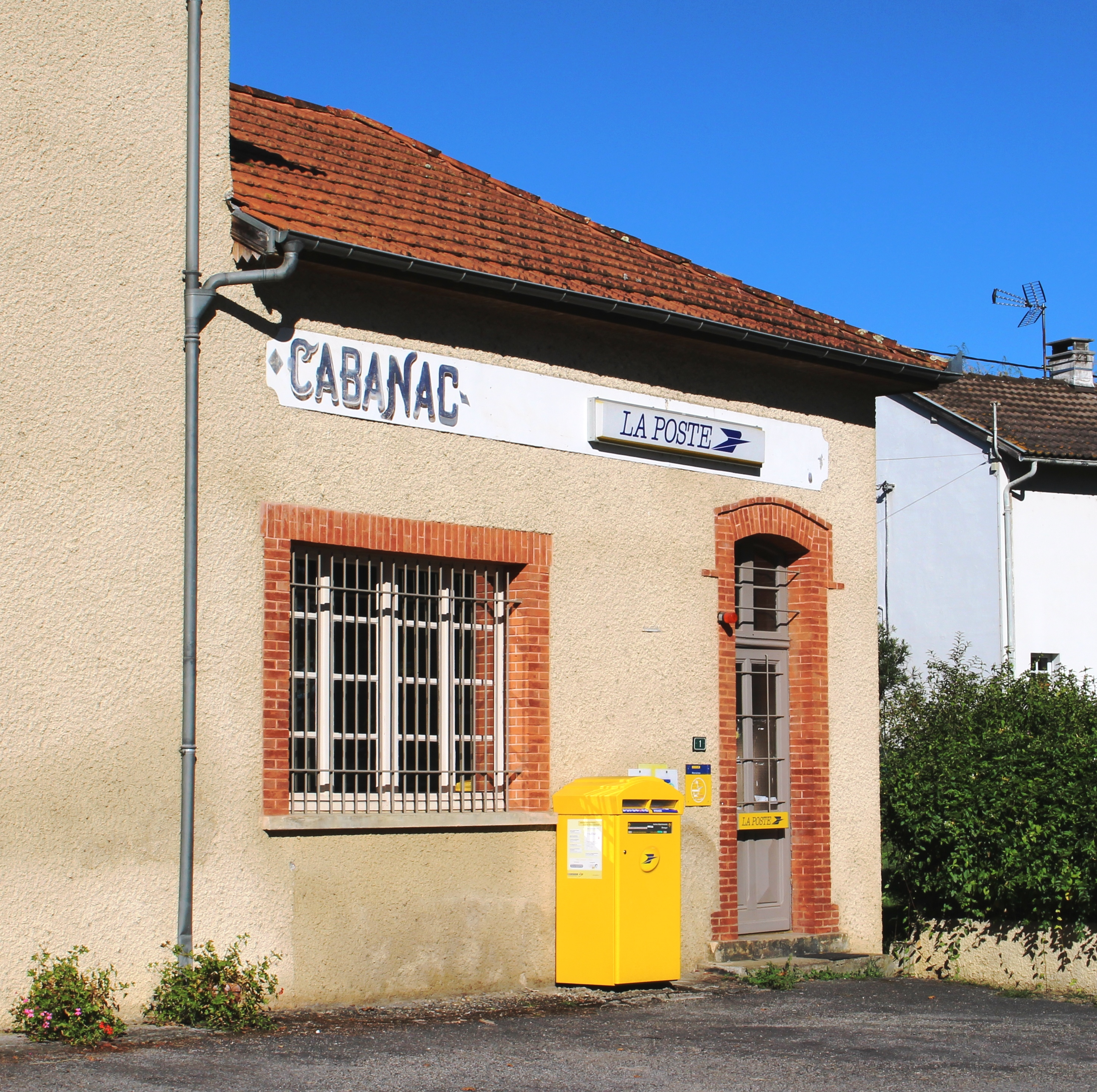 Poste de Cabanac (Hautes-Pyrénées)